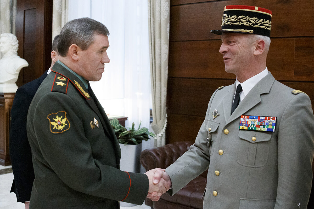 Начальник Генерального штаба Вооруженных Сил России генерал армии Валерий Герасимов провел в Москве переговоры с начальником штаба ВС Франции генералом Франсуа Лекуантром